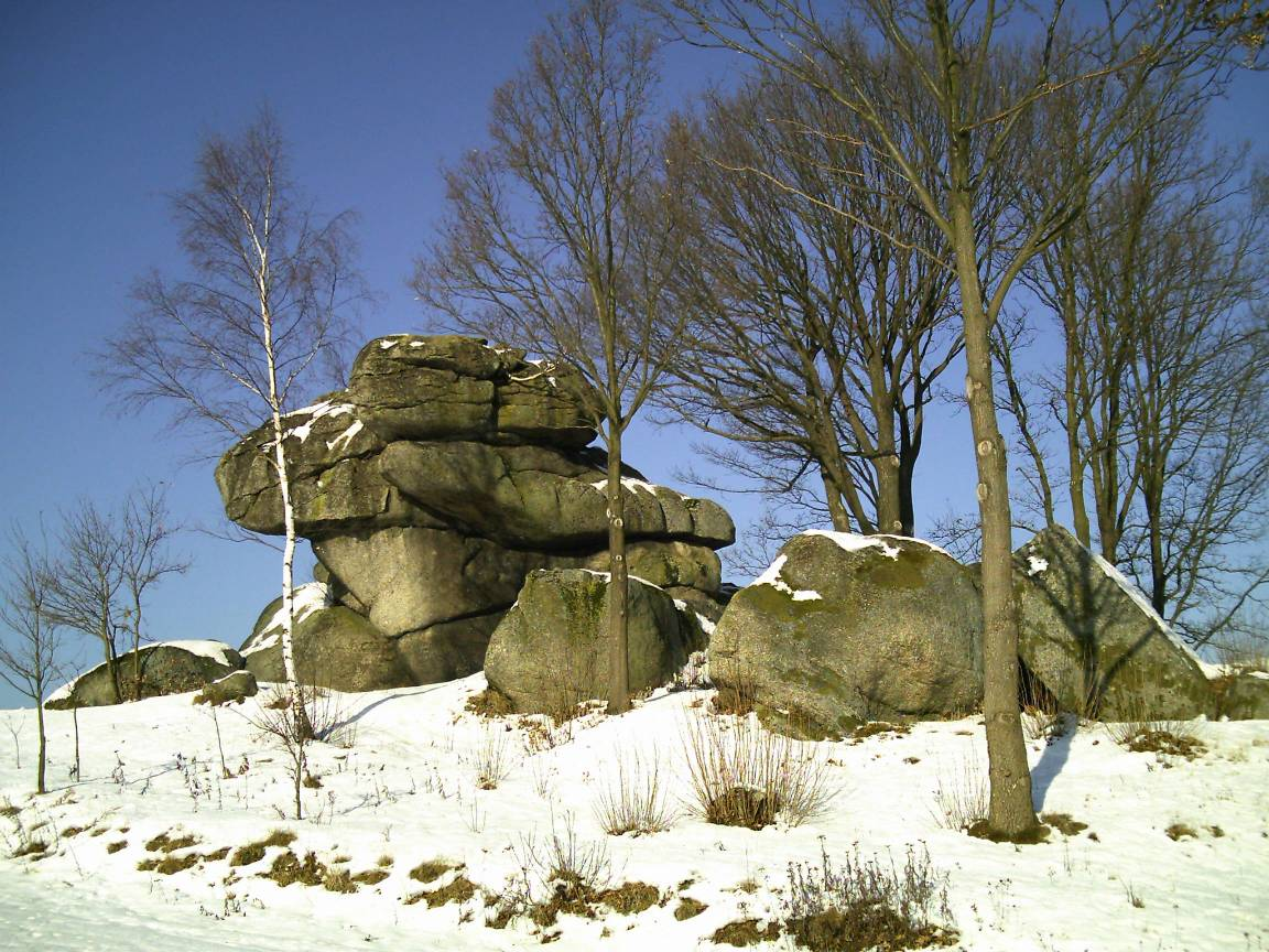 Wolfenstein, Felsformation in der Nähe von Tirschenreuth im Oberpfälzer Wald.